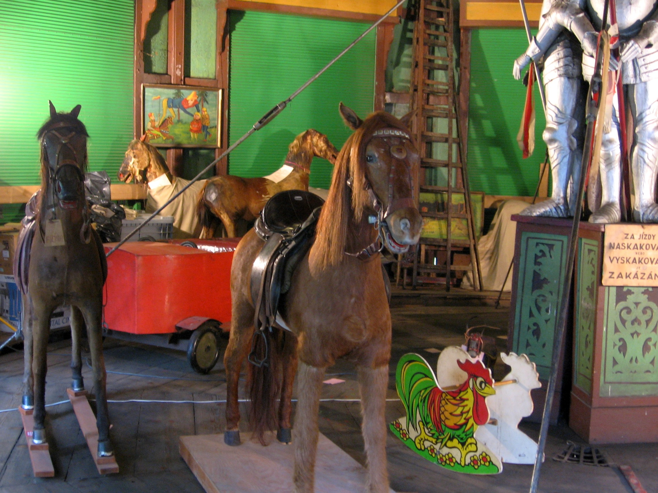 Kolotoč na Letné